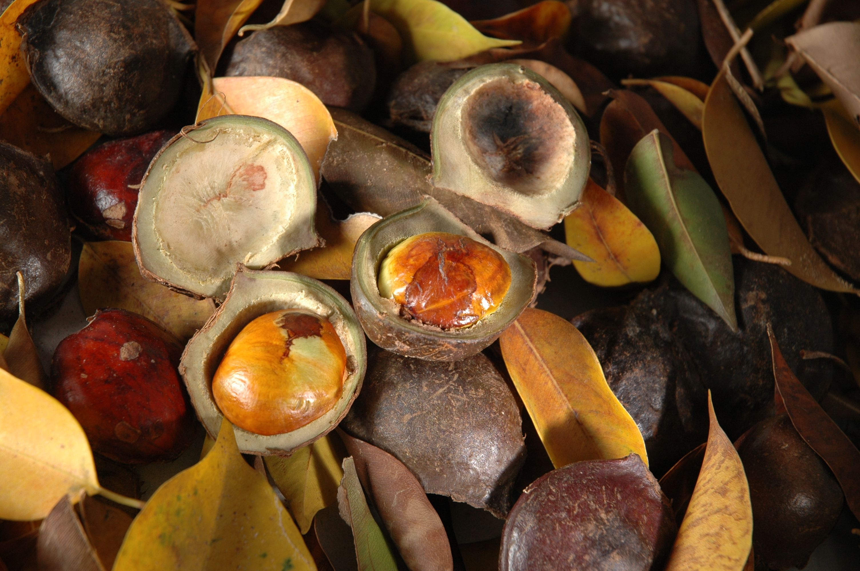 Archidendron jiringa, Indonesia: Jengkol/jering